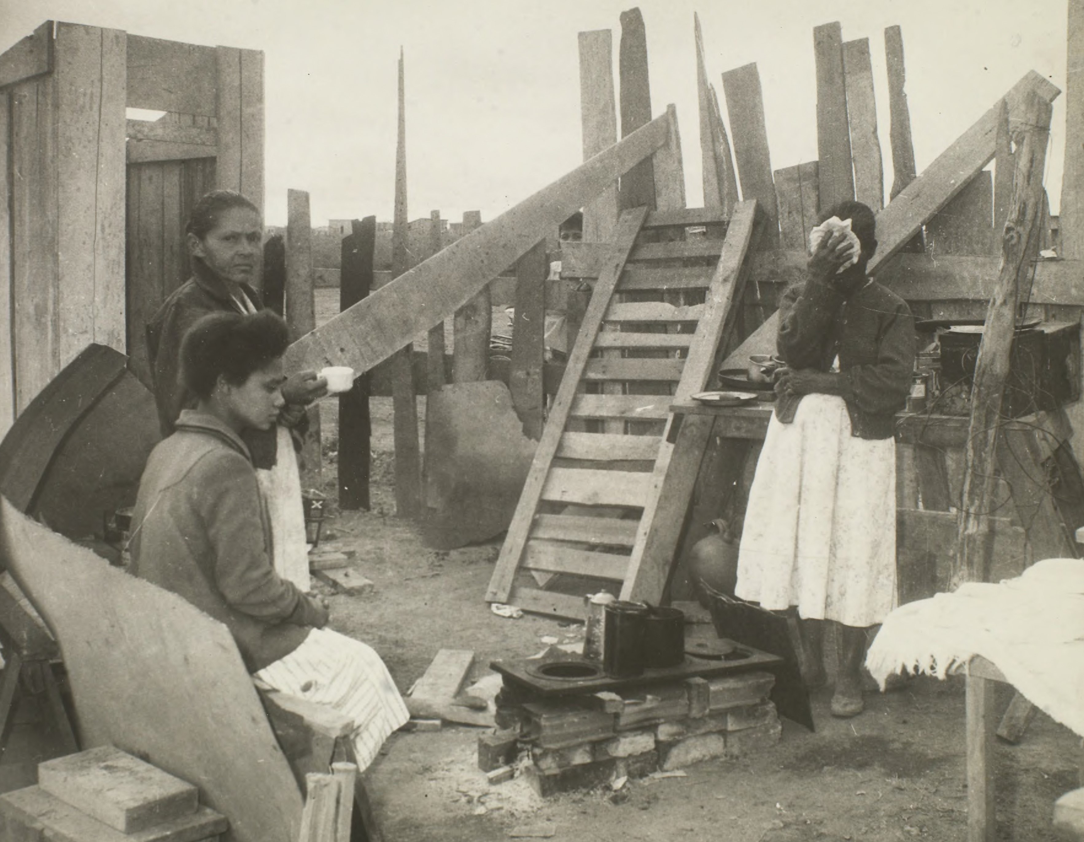 Fotografia do Fundo Correio da Manhã, sob a guarda do Arquivo Nacional.